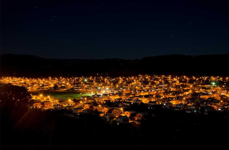 Pueblo de Lanco de noche.